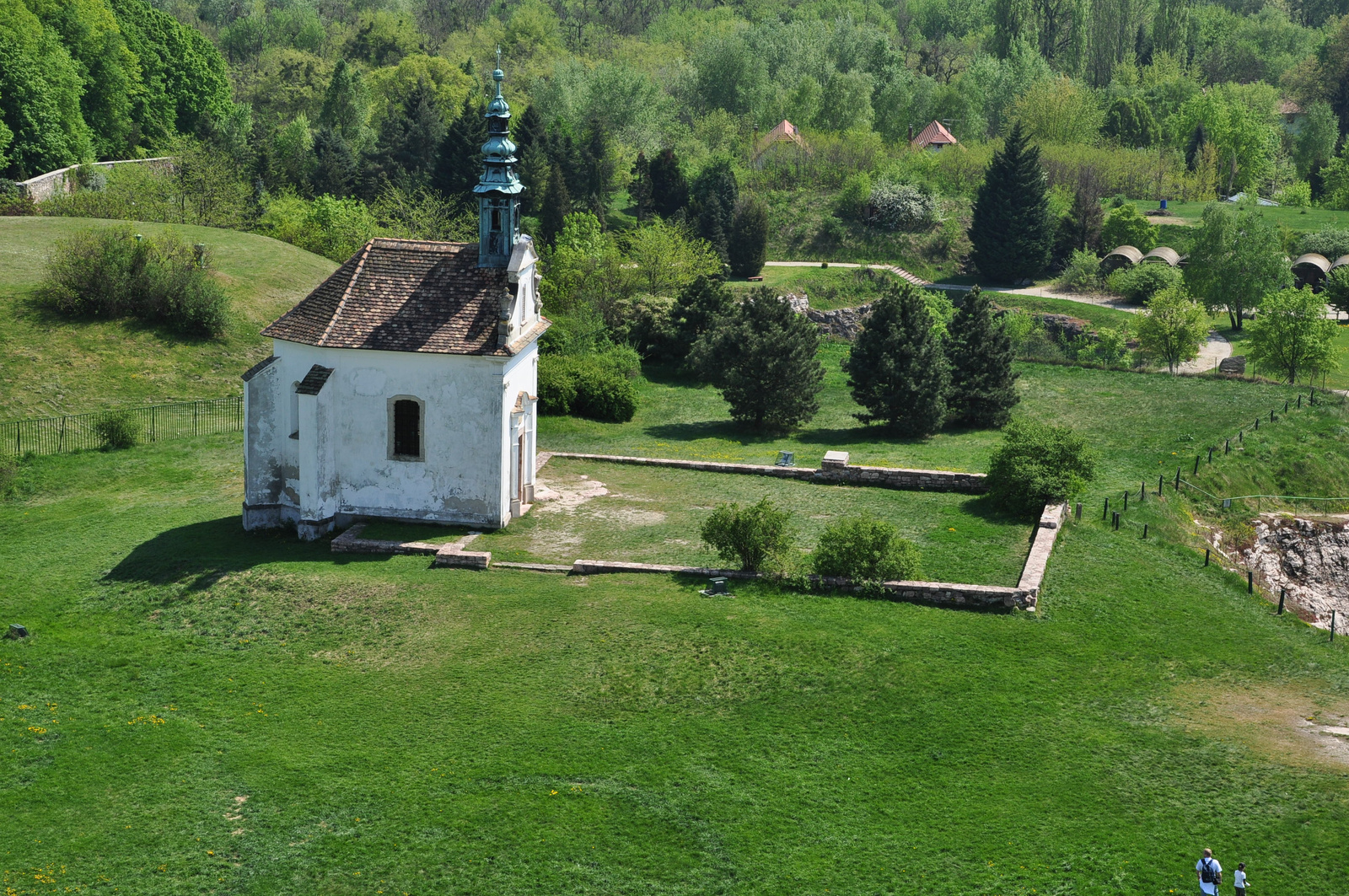 Kálvária kápolna (Tata, Kálváriadomb)